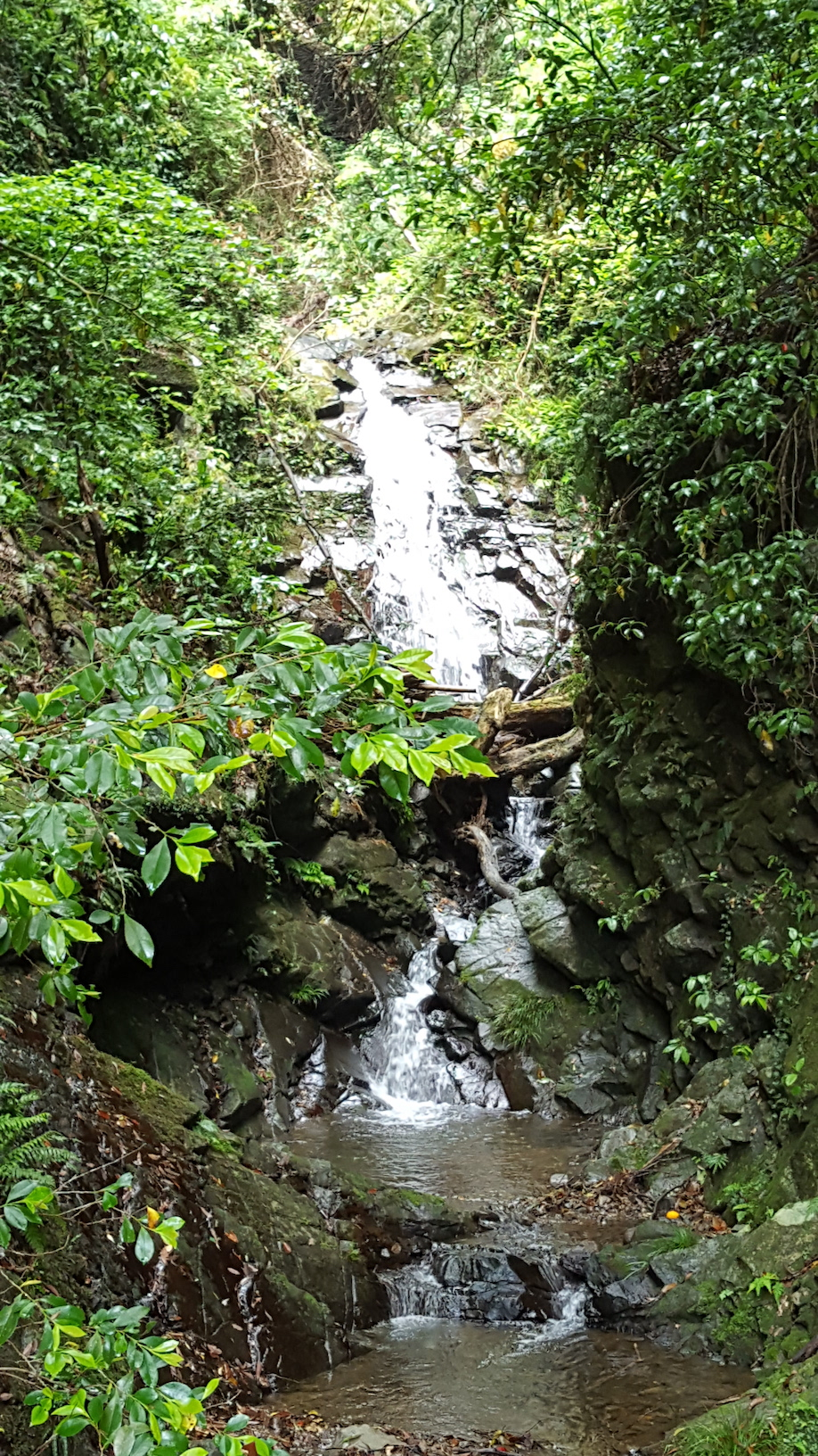 山原大滝（やんばらおおたき）